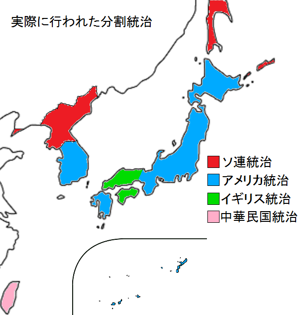 実際に行われた日本の分割統治。より詳細な地図で上書き願います。